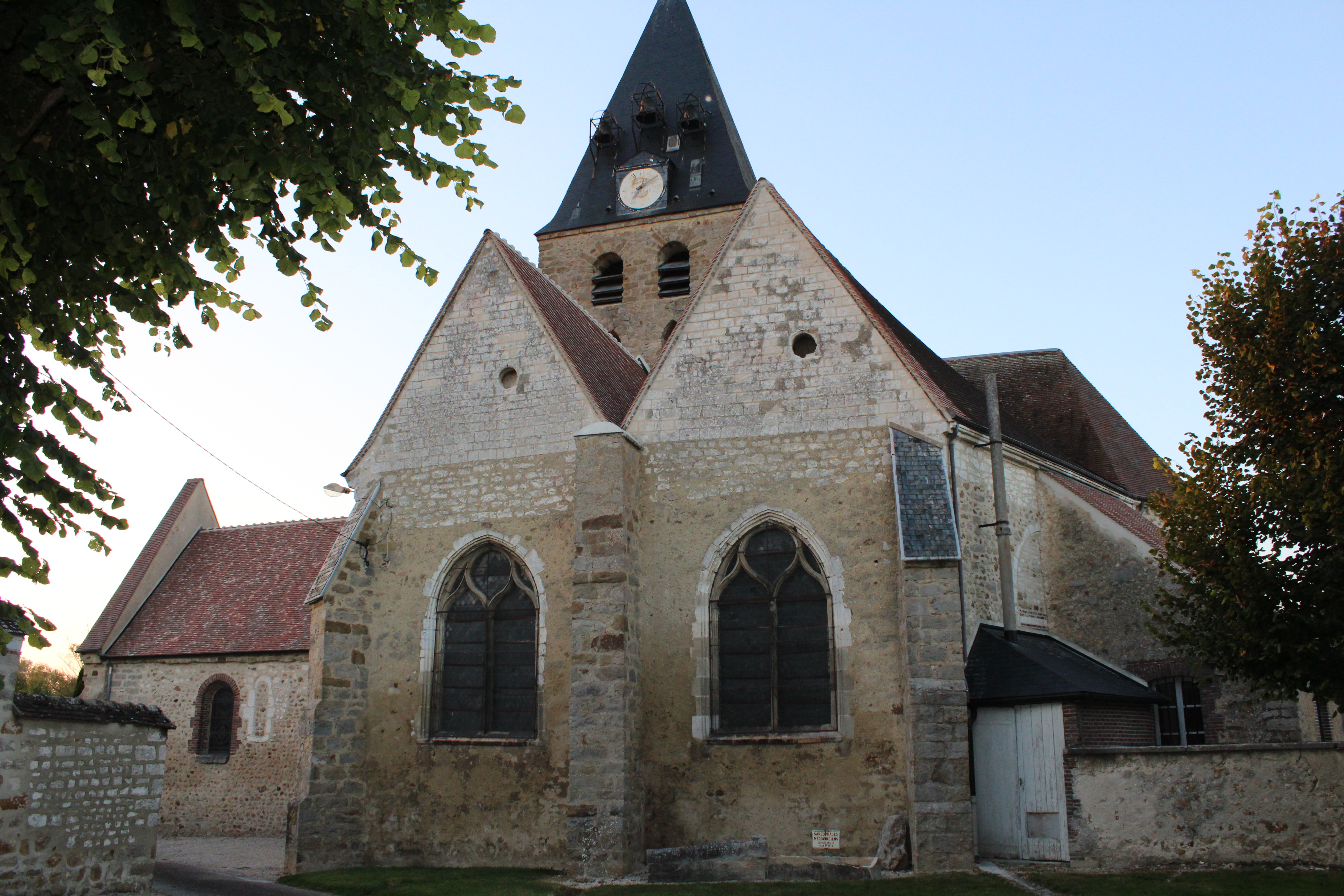 Église Saint-Leu-de-Sens à Marcilly-le-Hayer (10).